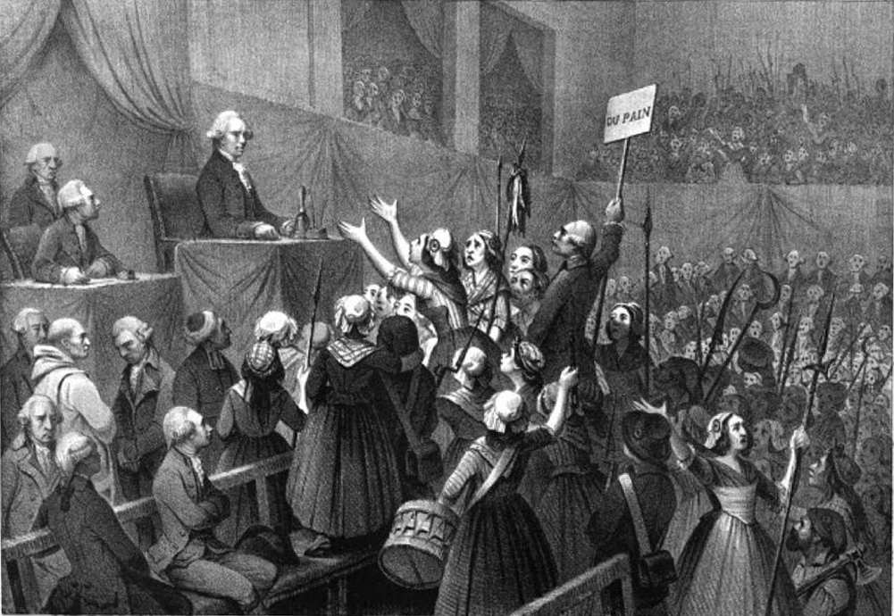 Album du Dauphiné - tome IV, litographie deJean-Joseph Mounier président à l'assemblée nationale, 5 et 6 oct 1789